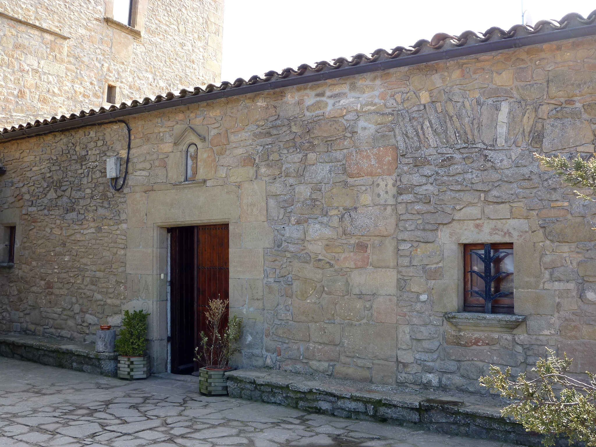 Hostal del Santuari de Pinós, dalt de la carena.